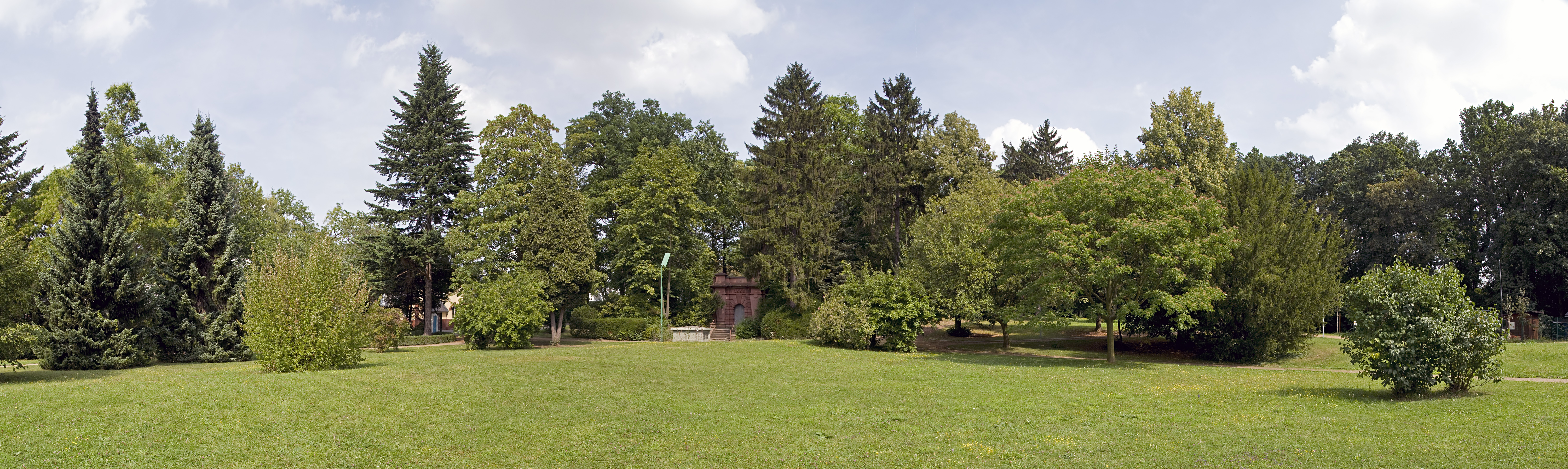 Wasserpark Frankfurt am Main Panoramablick von Westen mit dem Eingang des Hochbehälters